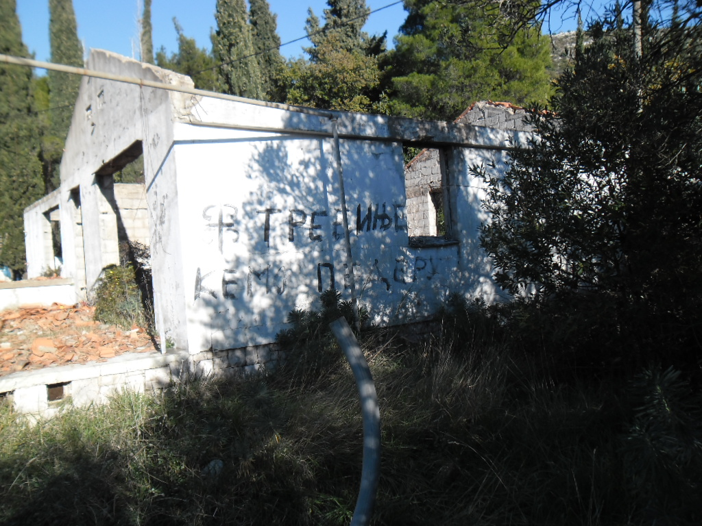 Slađenovići kraj Slanoga: ruševine iz Domovinskog rata